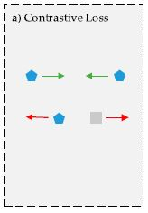 تابع هزینه متضاد، یادگیری متریک عمیق